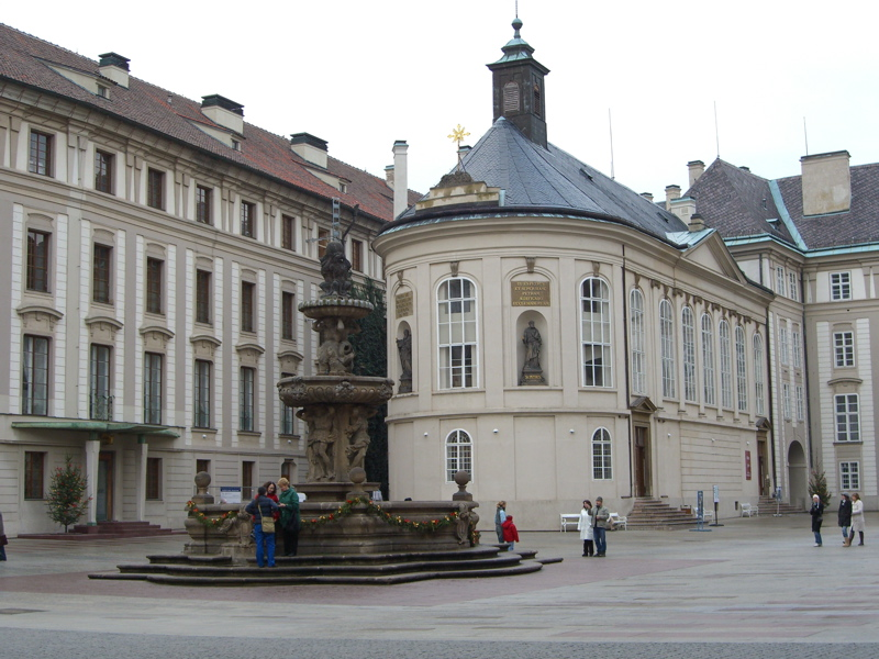 Pražský hrad, 2. nádvoří (Kohlova kašna a Kaple sv. Kříže)